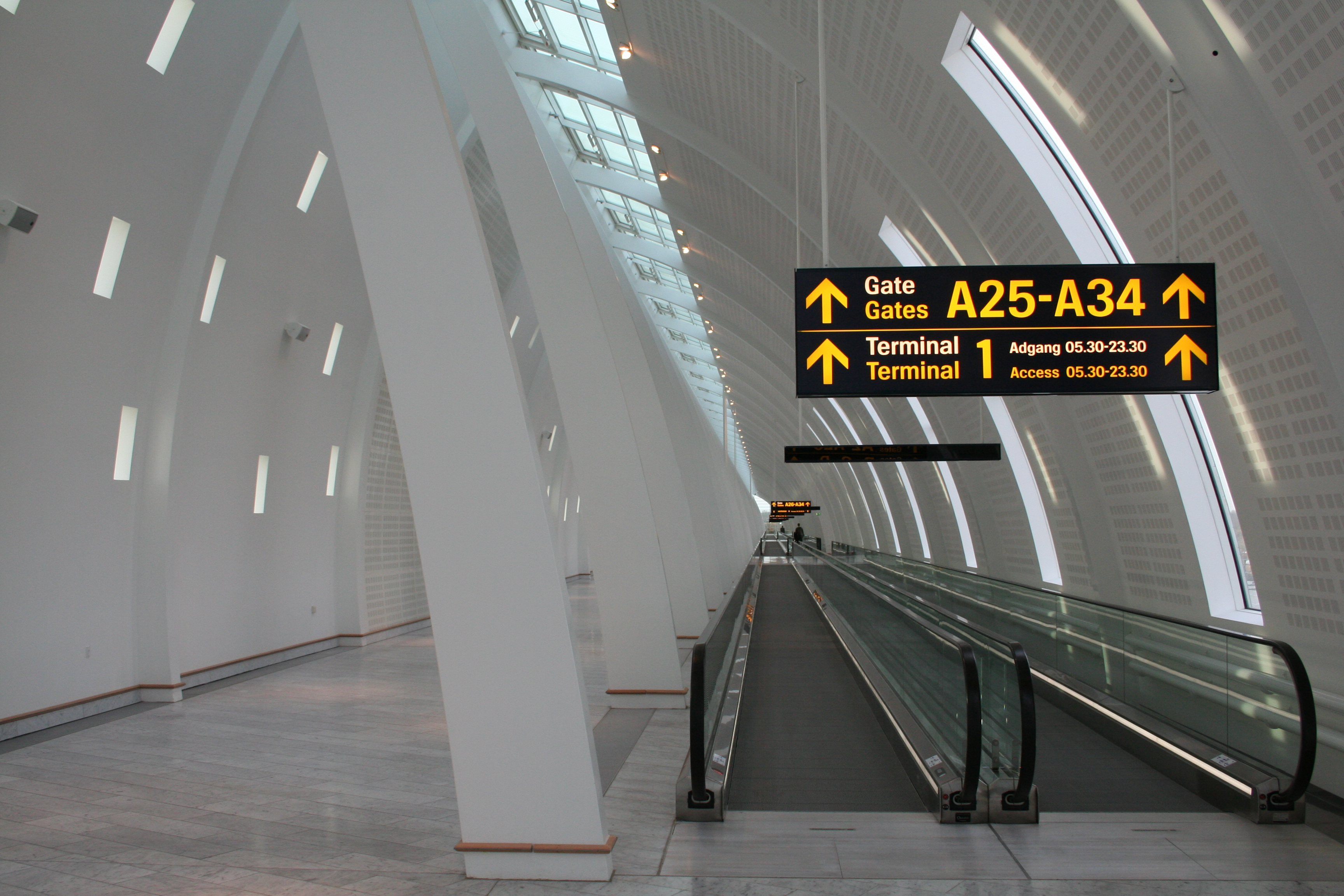 Le couloir menant du terminal 2 au terminal 1 de l'aéroport de Copenhague.